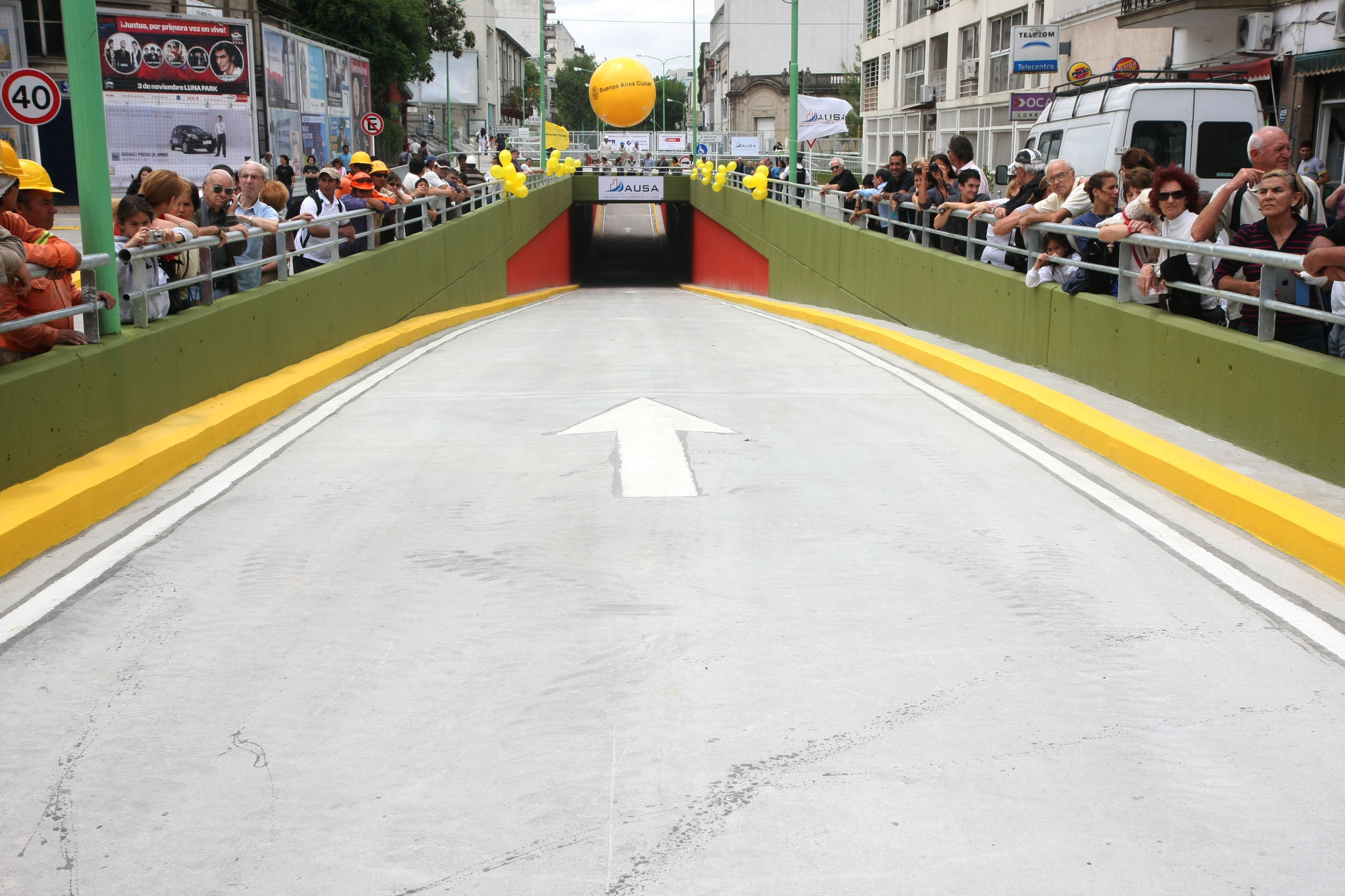 Buenos Aires. Diciembre 16 de 2011. El jefe de Gobierno porteño, Mauricio Macri, dejó inaugurado oficialmente hoy el paso de la calle Manuela Pedraza bajo nivel del ex Ferrocarril Mitre – Ramal Tigre que mejorará la seguridad vial y la conectividad en el barrio de Núñez. Lo acompañaron la vicejefa de Gobierno, María Eugenia Vidal; el ministro de Desarrollo Urbano, Daniel Chain, y el presidente de Autopistas Urbanas SA, Gustavo Matta y Trejo. Foto Matías Repetto Bonpland-gv/GCBA.